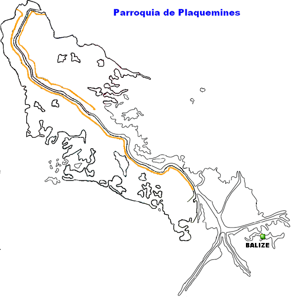 BALIZE, LA